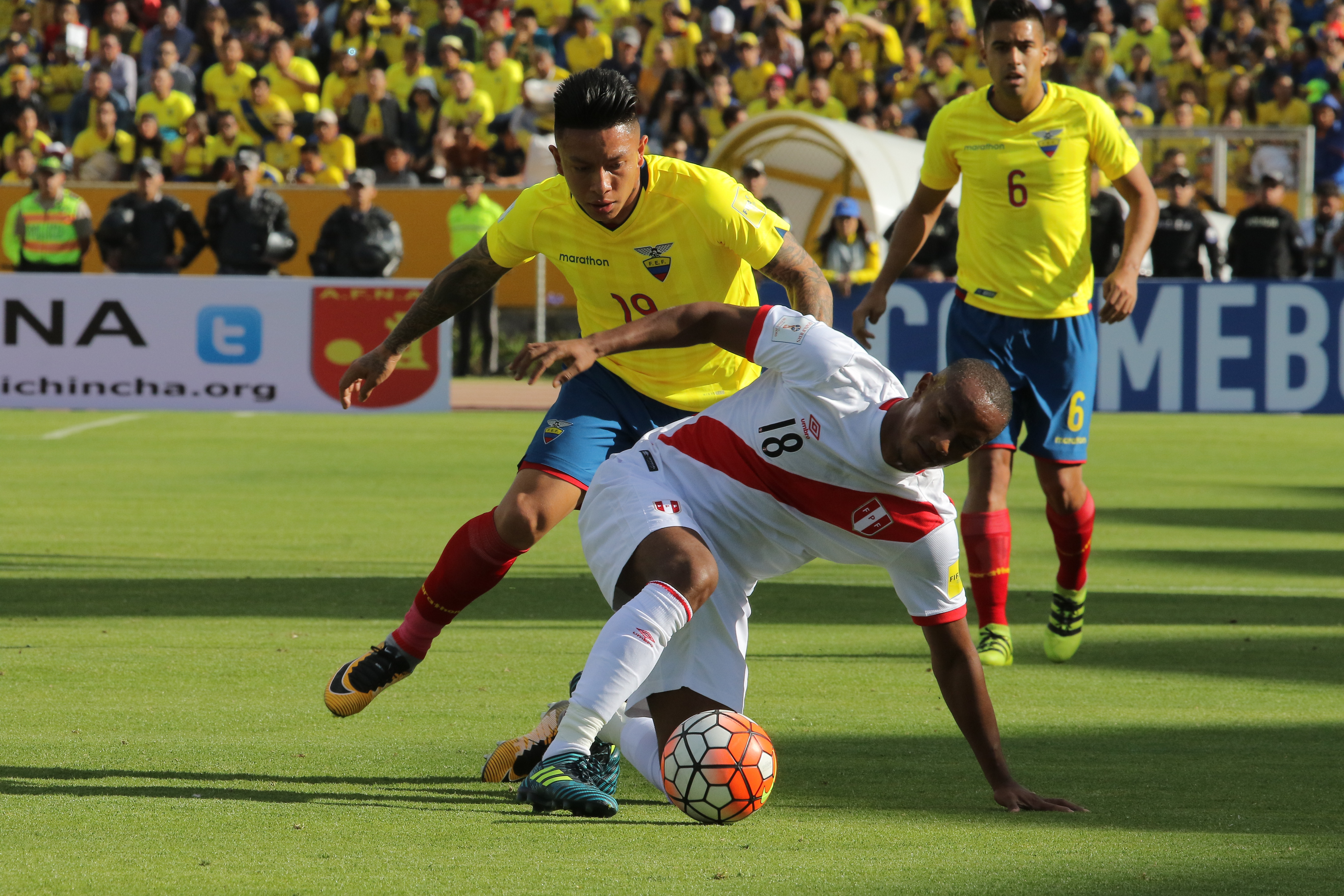 Quito 5 Sep (Andes).- Encuentro por eliminatorias Rusia 2018 entre Ecuador y Perú. Fotografías: Carlos Rodríguez/Andes.